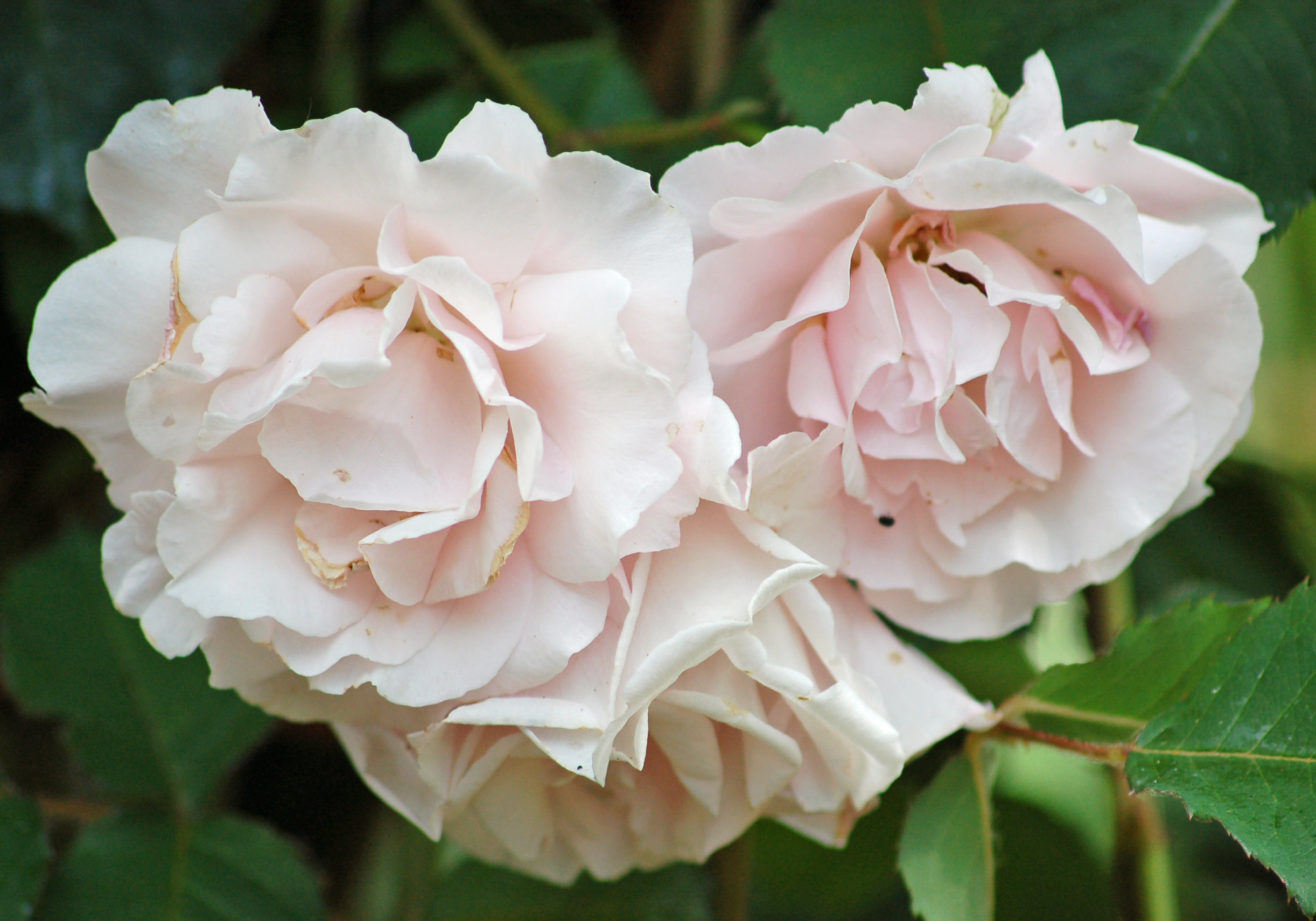 Kletterrose Johanna Röpke (Tantau 1931) im Rosarium Uetersen